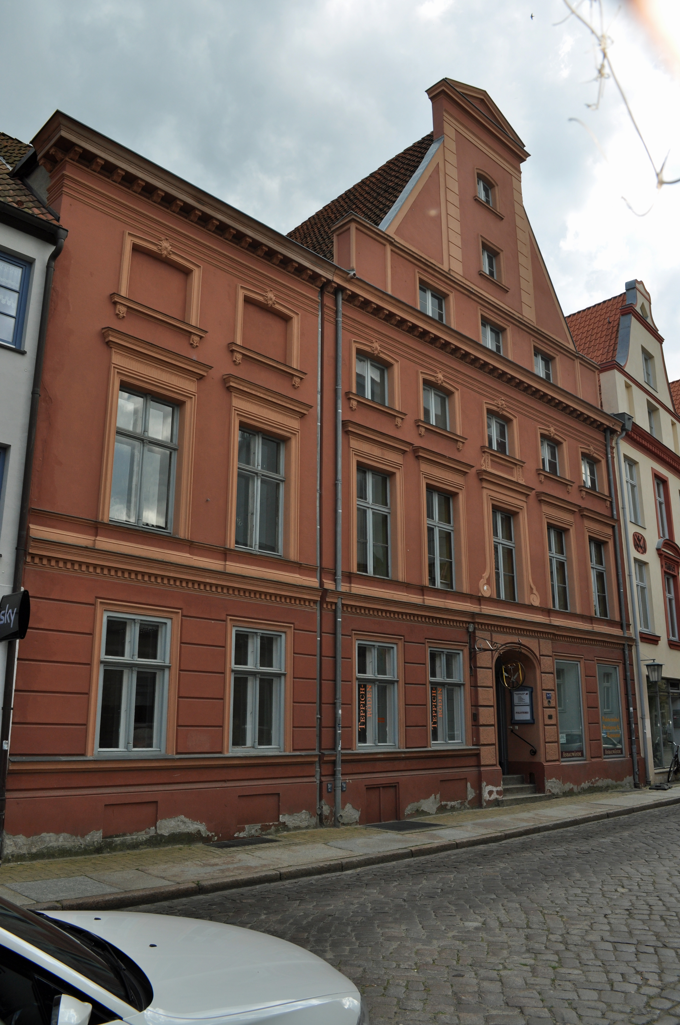 Das Foto zeigt ein Haus (bzw. Details des Hauses) in der Frankenstraße in Stralsund, Deutschland. Die Hausnummer steht im Dateinamen. Aufgenommen am 19. Juli 2011 vom Benutzer:Klugschnacker.